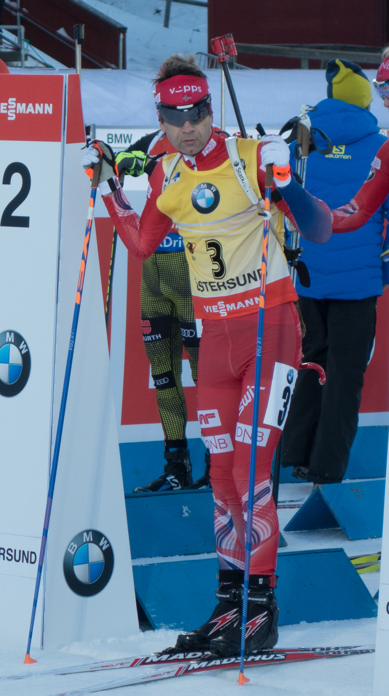 Ole Einar Björndalen strax innan start på Jaktstarten i Världscupen i Östersund